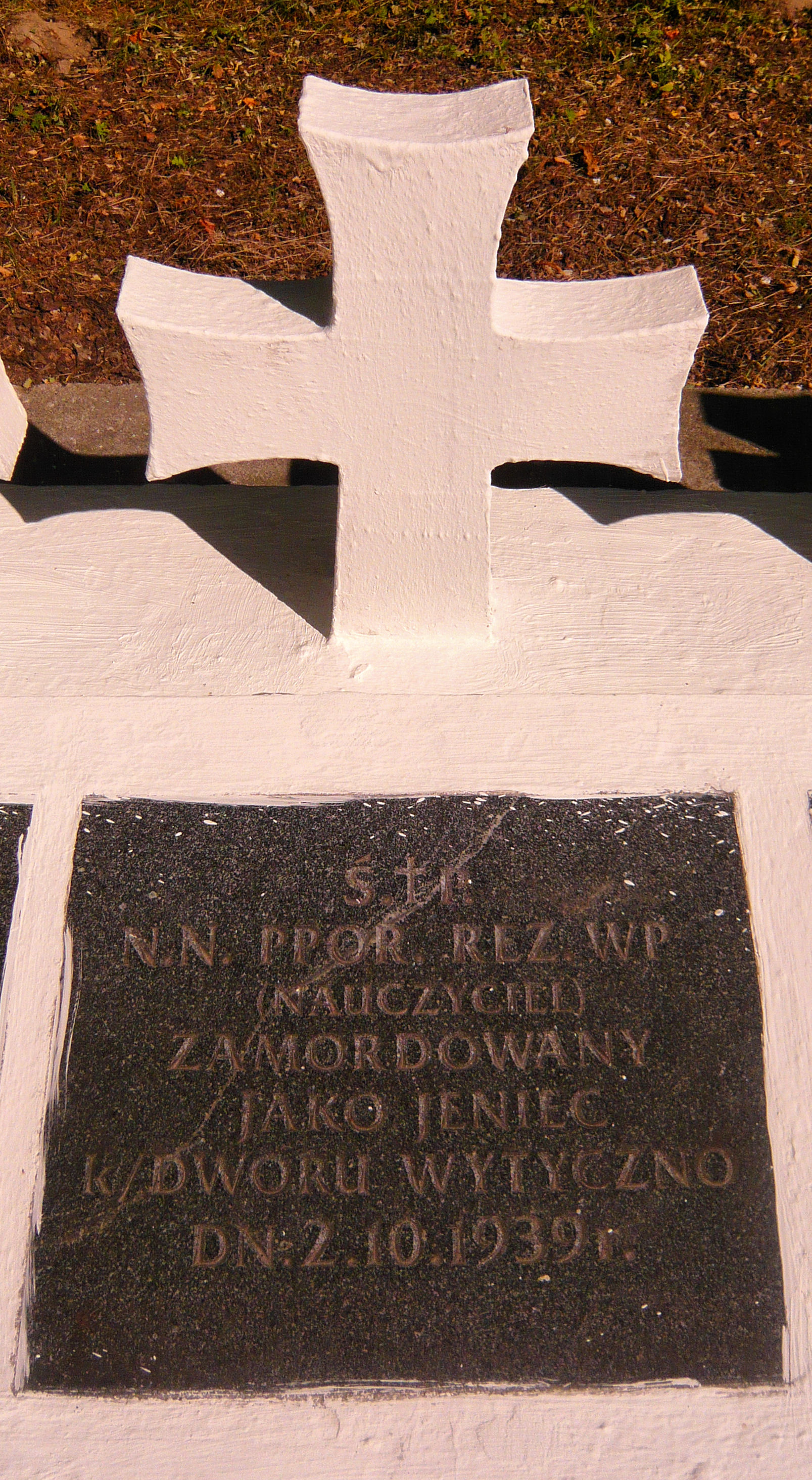 Wytyczno - cmentarz żołnierzy KOP poległych w walkach i z Armią Czerwoną oraz zamordowanych w niewoli przez żołnierzy Armii Czerwonej